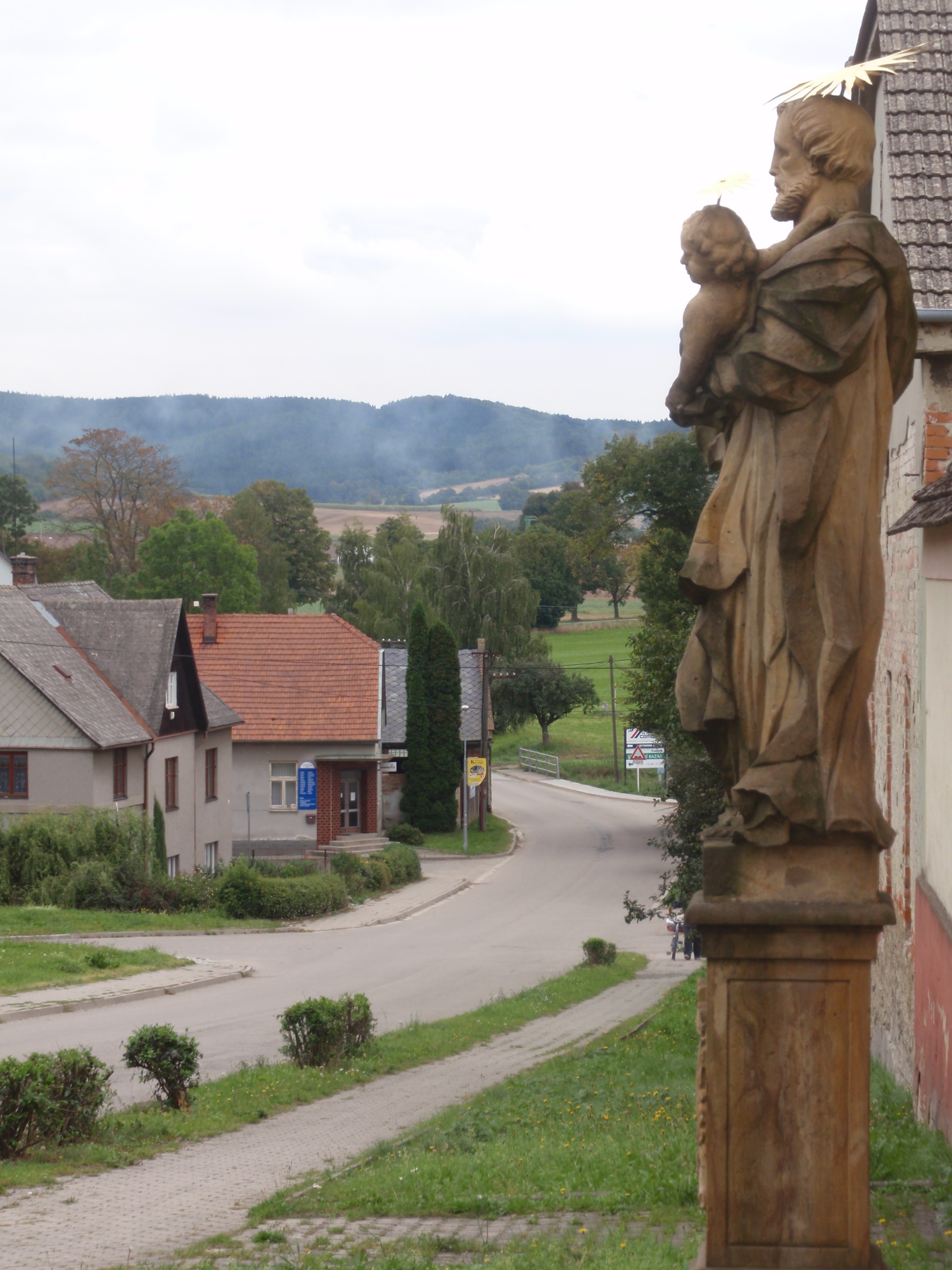 Socha sv. Josefa (Jevíčko), Olomoucká, Jevíčko